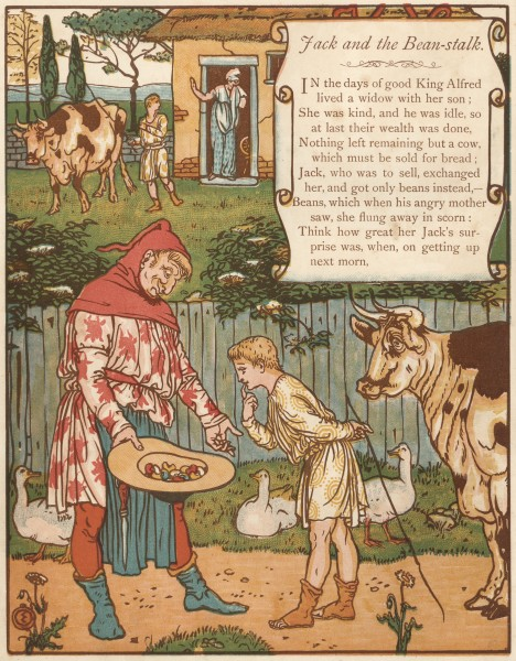 Гравюры по рисункам Крейна к сказкам «Синяя Борода», «Спящая Красавица», «Красная Шапочка», «Джек и бобовый стебель»